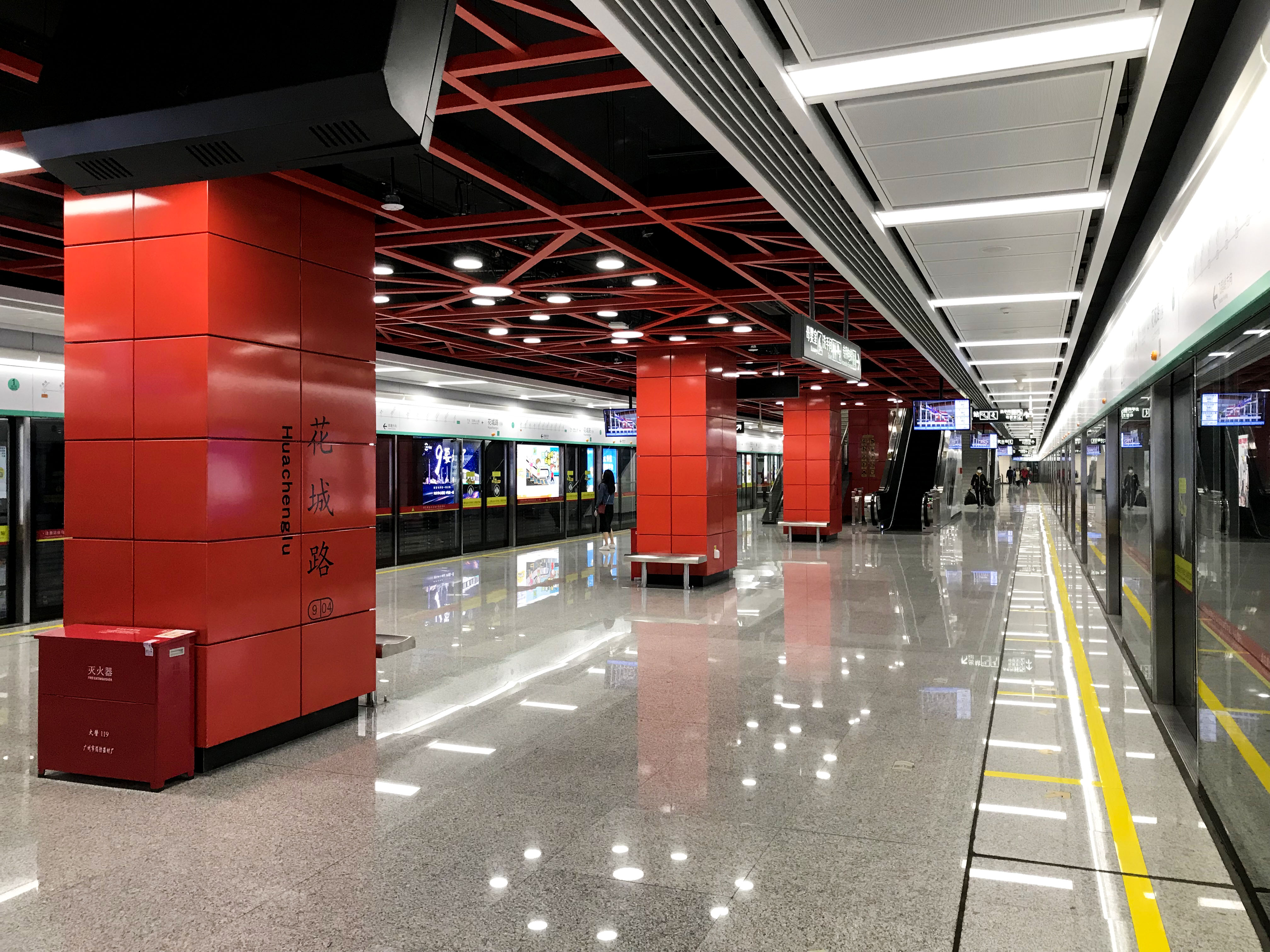 广州地铁花城路站